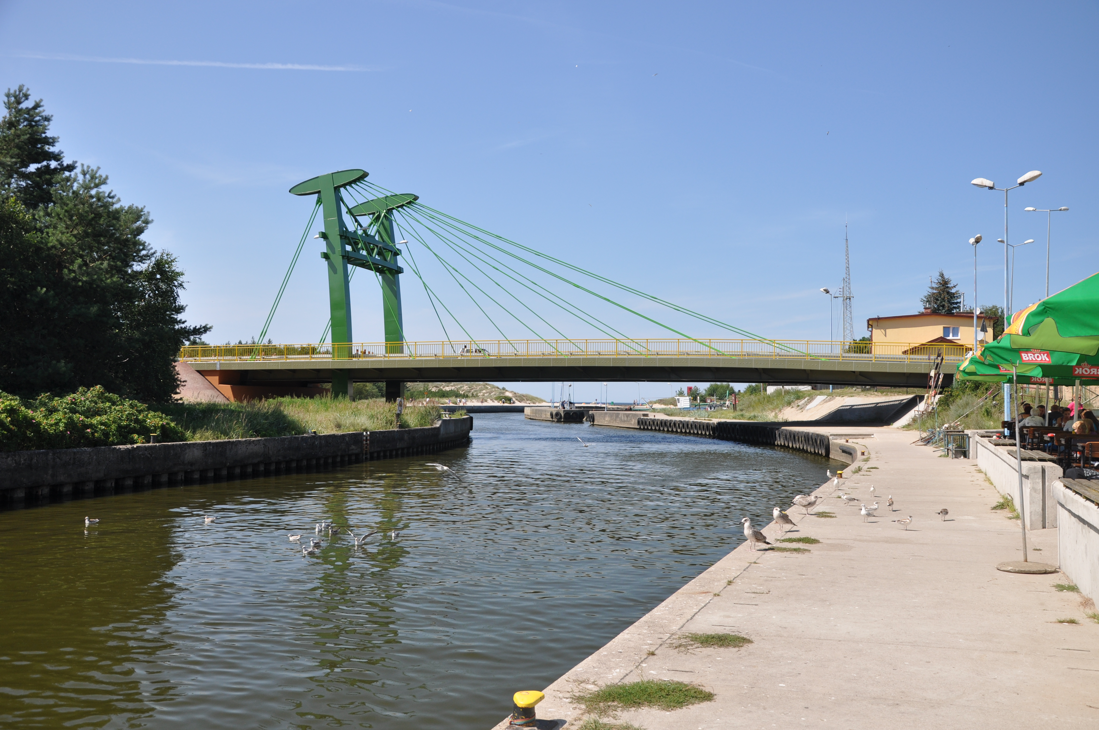 Most drogi powiatowej nr 0152Z w Dźwirzynie – ujęcie od strony południowej, z nabrzeża portowego